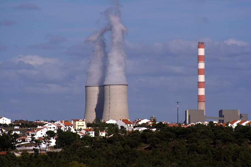 Pego's Power Plant (view from Rossio ao Sul do Tejo)